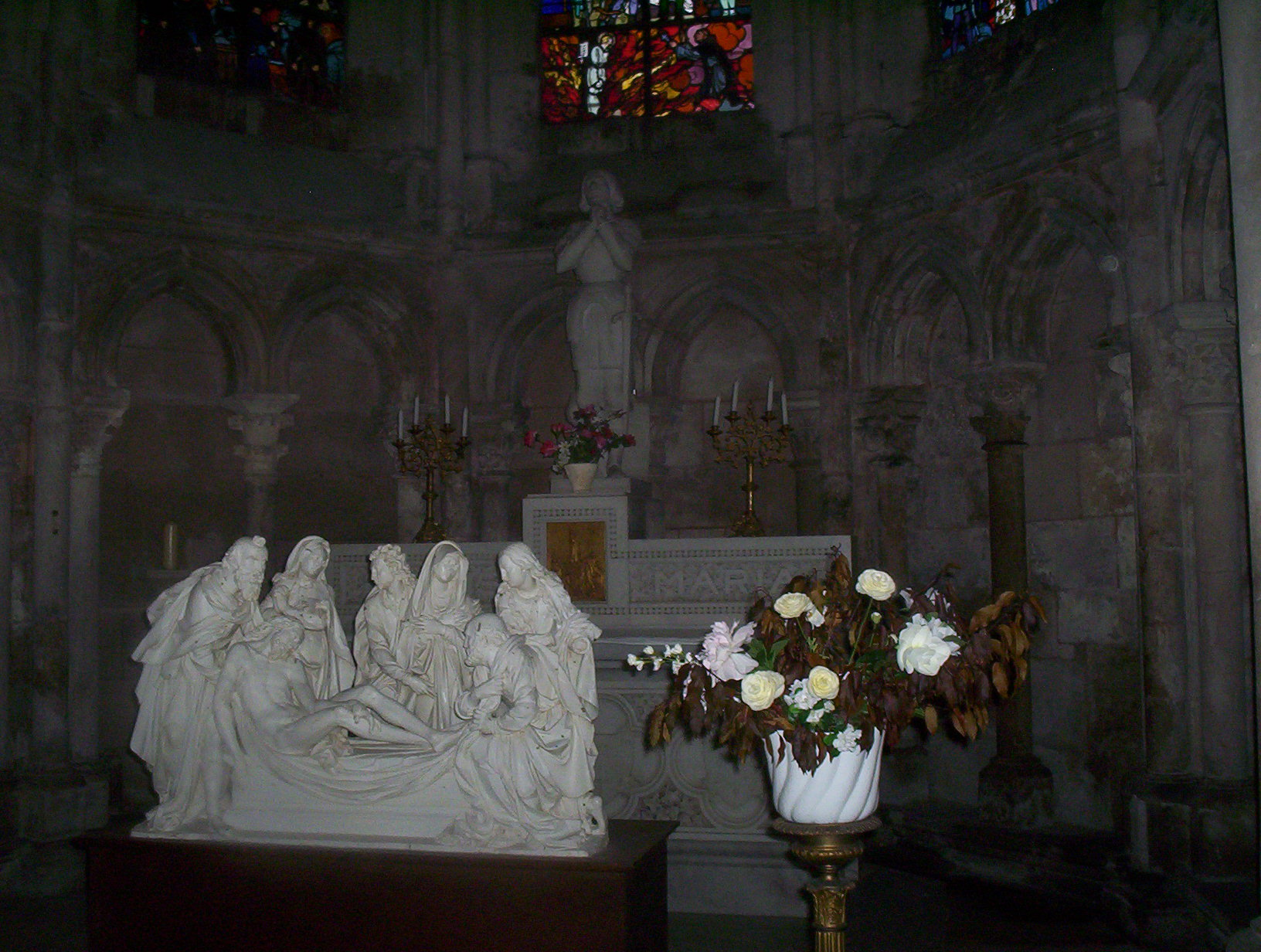 Une des 13 chapelles rayonnantes de la cathédrale du Mans